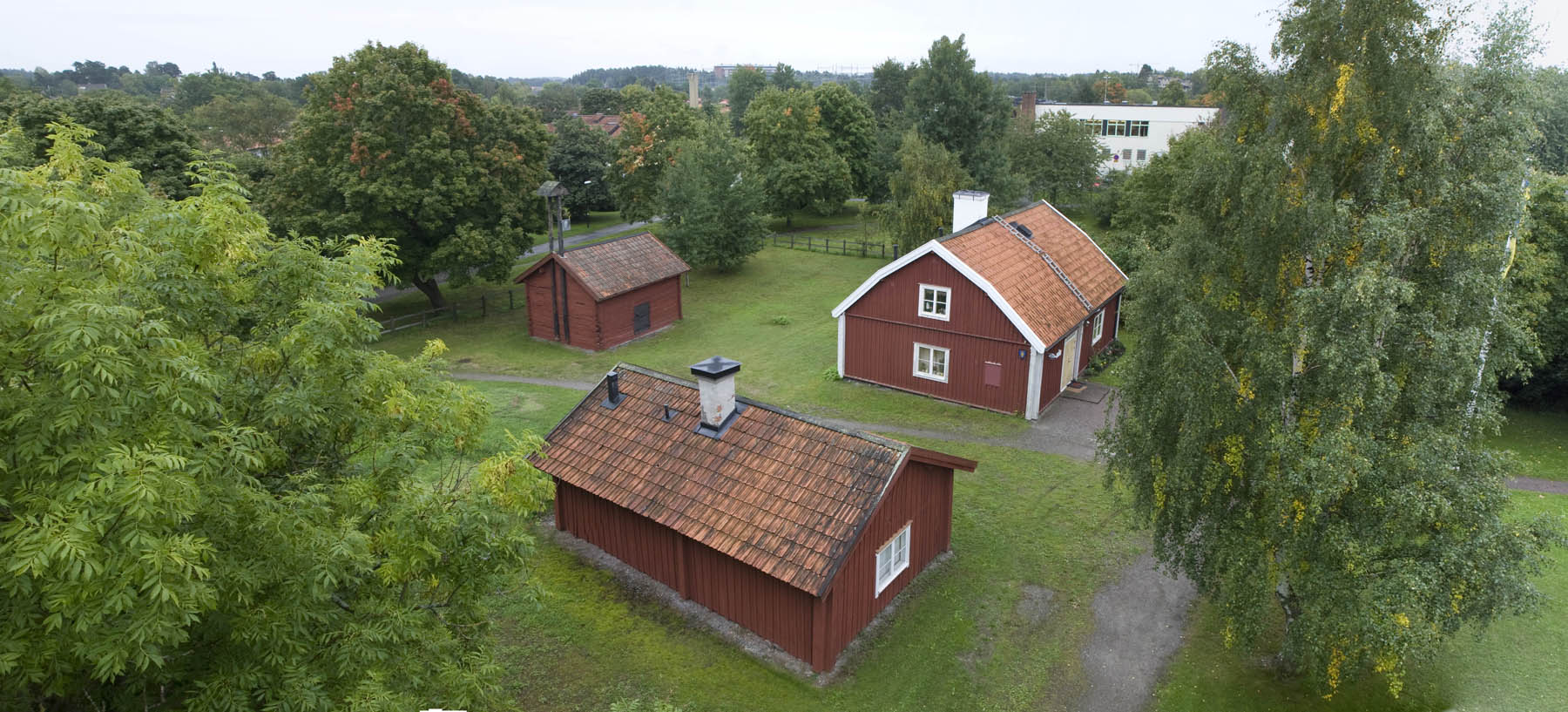 Nälsta gård, numera hembygdsgård för Spånga fornminnes- och hembygdsgille.Den 14 februari 1986 invigdes Nälsta gård som hembygdsgård.